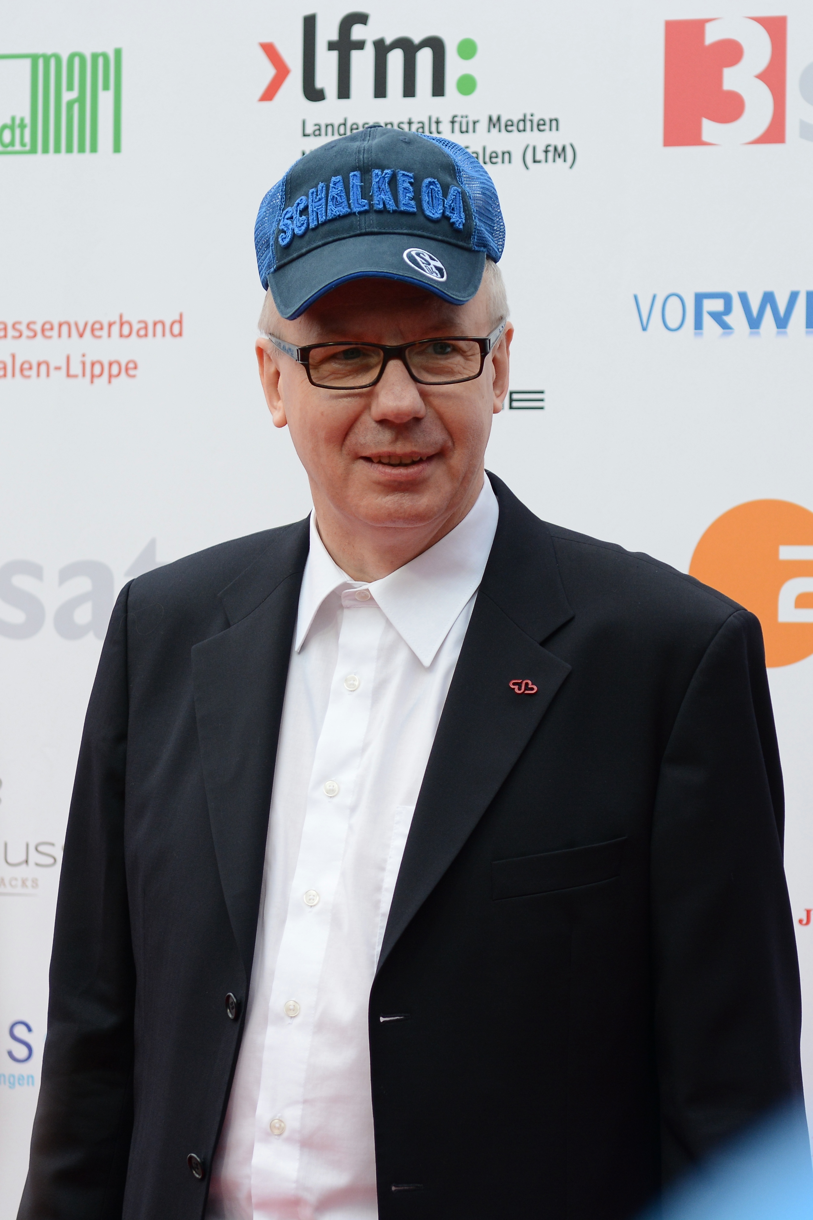 Ludger Pistor bei der Verleihung des Grimme-Preises 2014. War mit BVB-Krawatte angereist und tauscht auf dem roten Teppich mit einem Zuschauer gegen Schalke-Kappe.